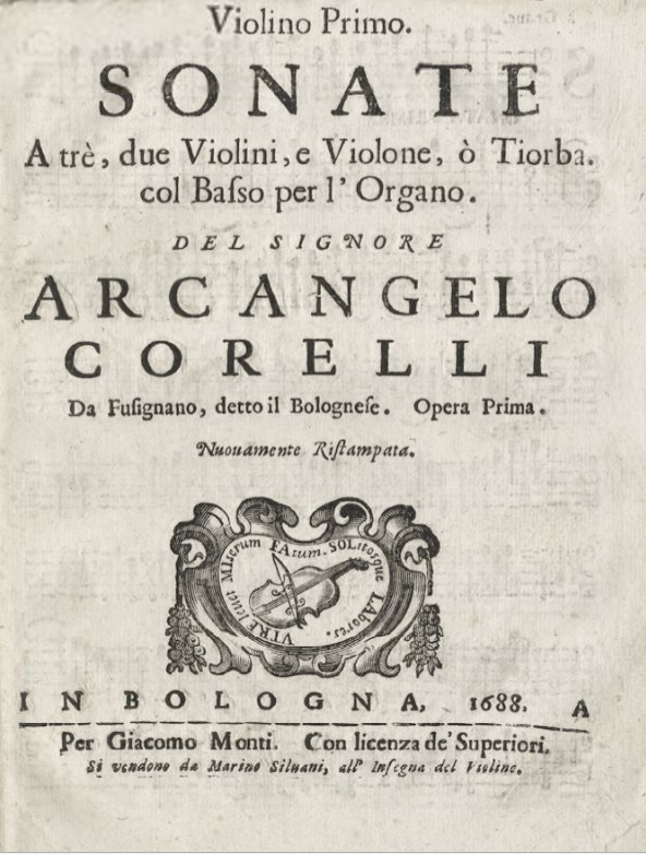 Capa do opus 1 de Arcangelo Corelli - parte do violino primo